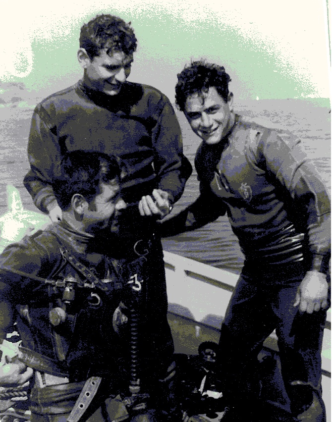 איתן ליפשיץ מתכונן לצלילה מיכאל הדני מימין וערן להב משמאל, לה-ספציה 1962.